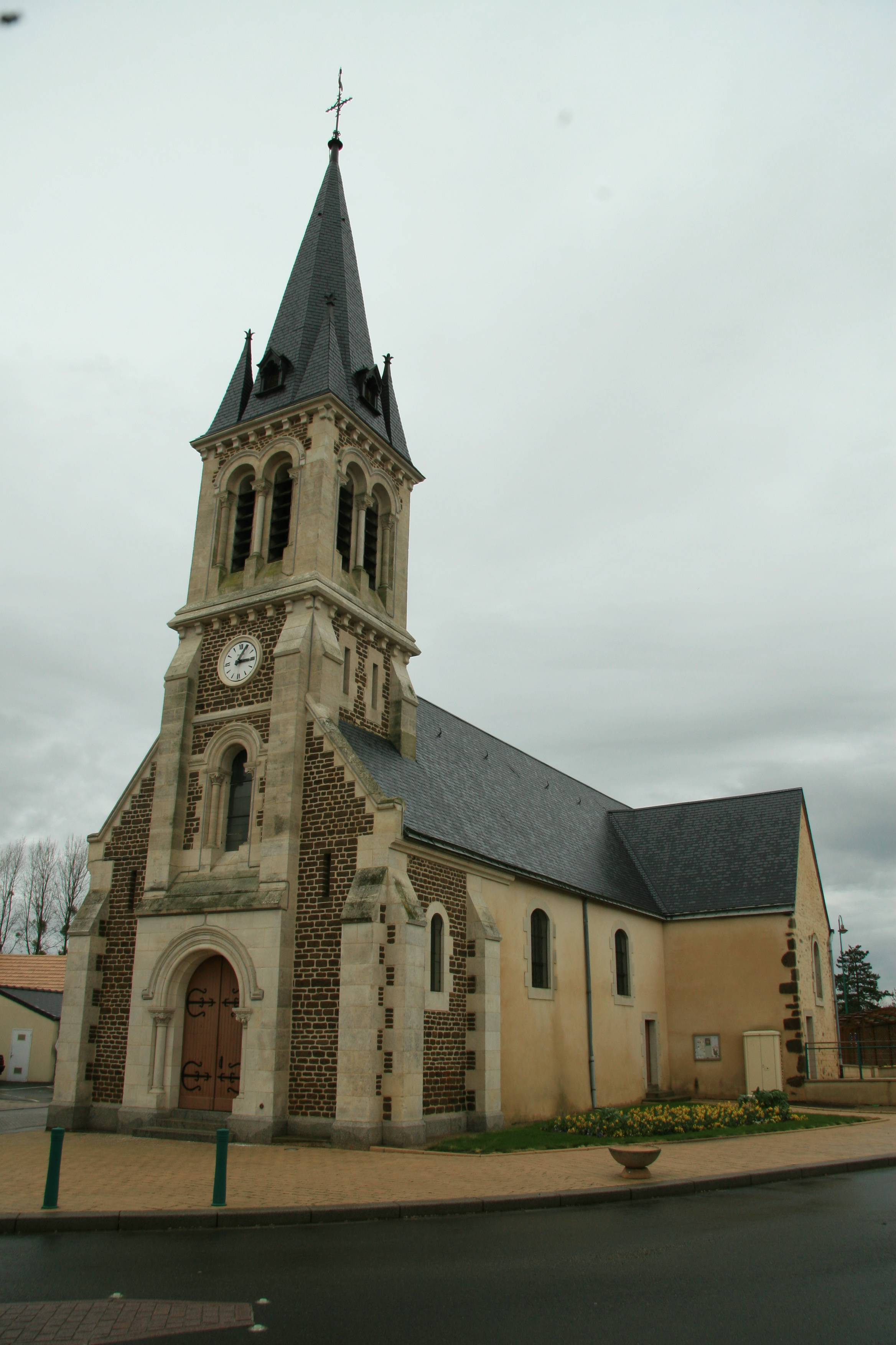 Eglise de St Jamme-sur-Sarthe